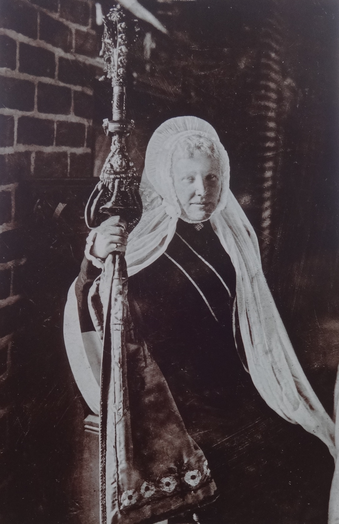 Adolphine von Rohr (1855 bis 1923) war eine Äbtissin des Klosters Stift zum Heiligengrabe. Eine Informationstafel auf dem Klostergelände beschreibt ihr Wirken für das Kloster.